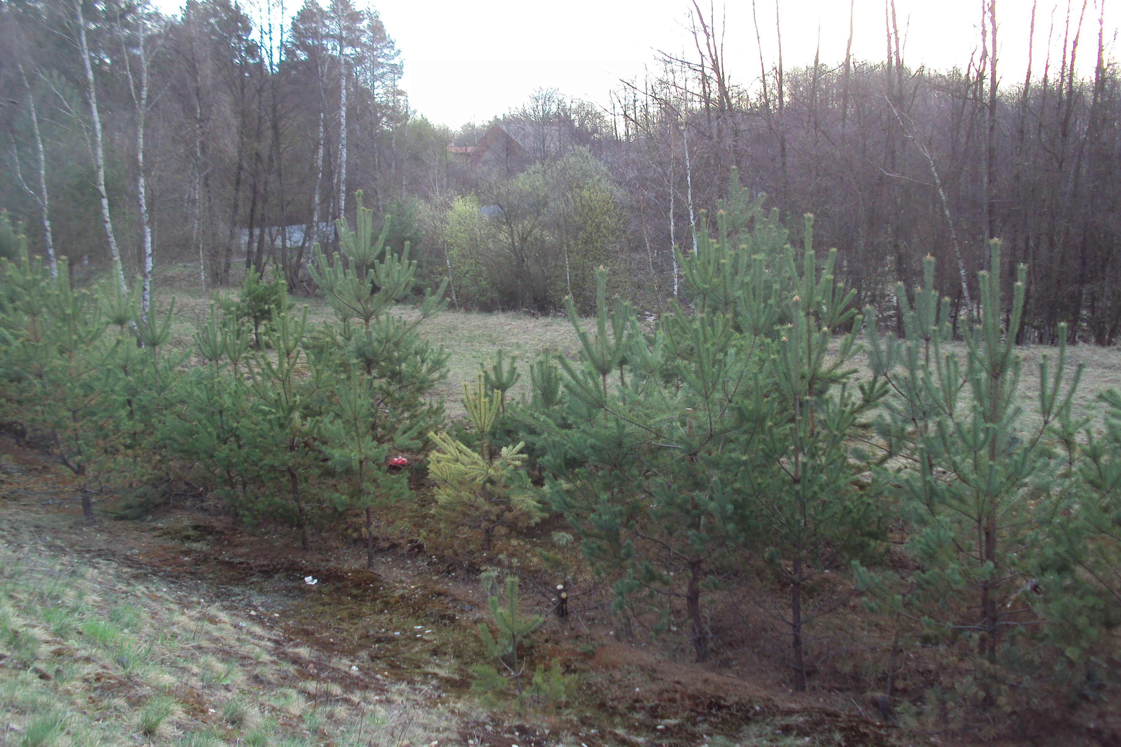 Vesnička Boreček, druhá část, ze silnice 270 Mimoň-Hradčany